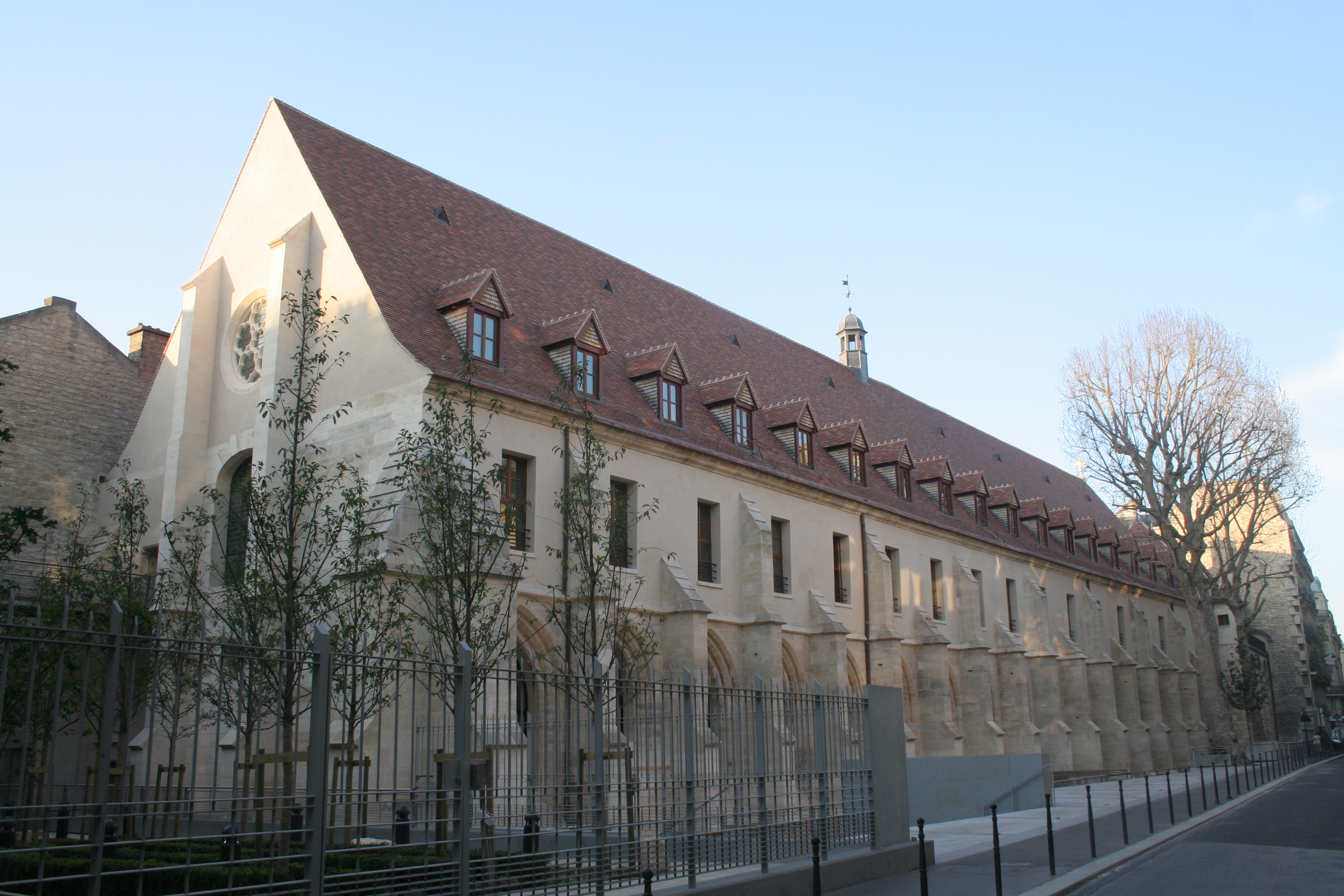 Façade du Collège des Bernardins de jour